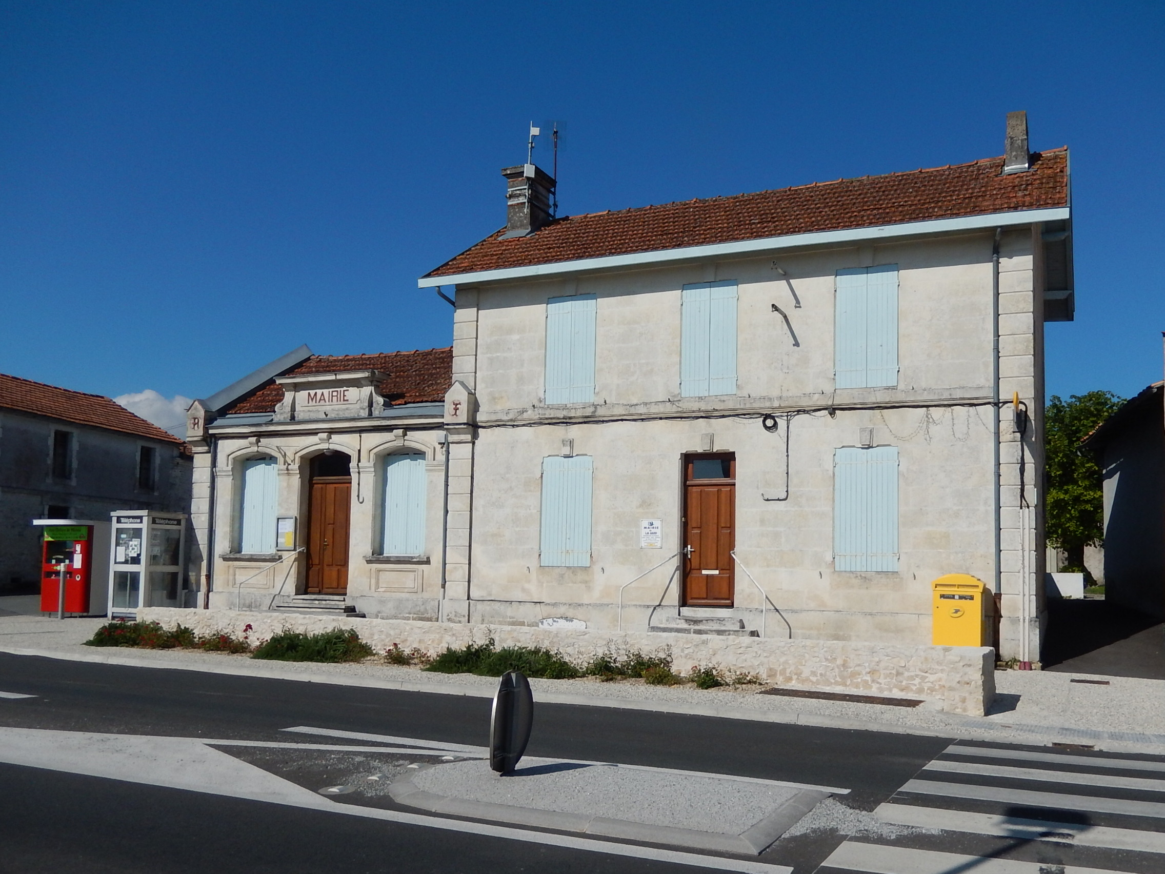 La mairie de La Jard (Charente-Maritime, France), située sur la route départementale D137.